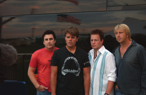 Lonestar in Fleet Rec Park, Norfolk, Virginia